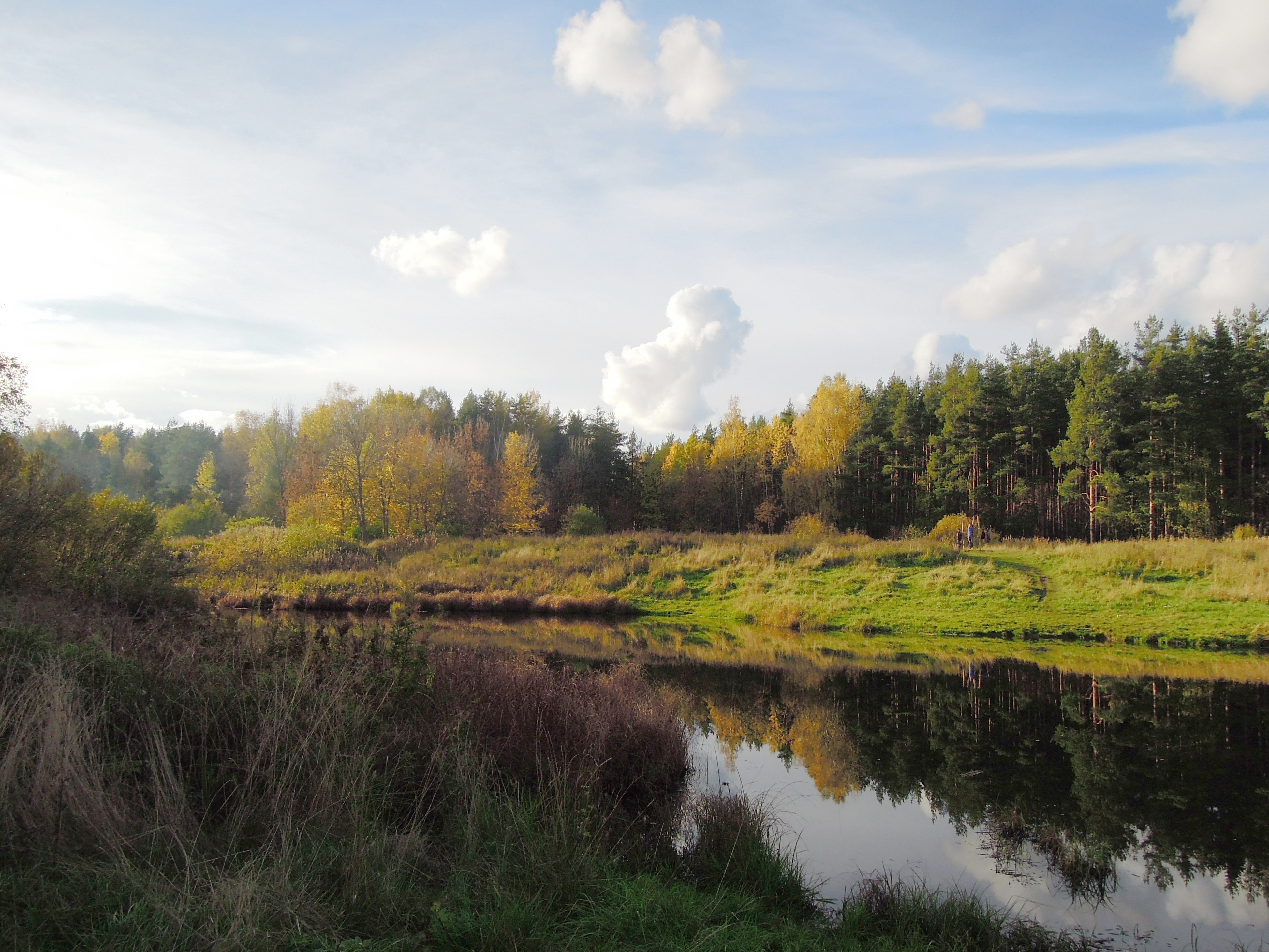 Ржевский лесопарк: На восточной окраине Санкт-Петербурга и в юго-западной части Всеволожского района,Всеволожский район, Ленинградская область This image is related to the protected area of Russia number 4710041